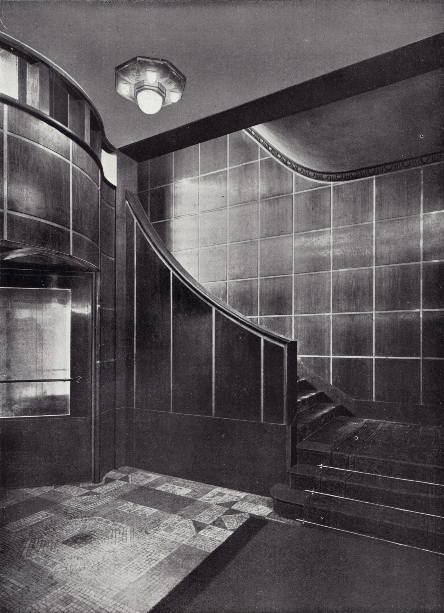 Berlin - Weinhaus Rheingold, Eingangsvestibül an der Potsdamer Strasse